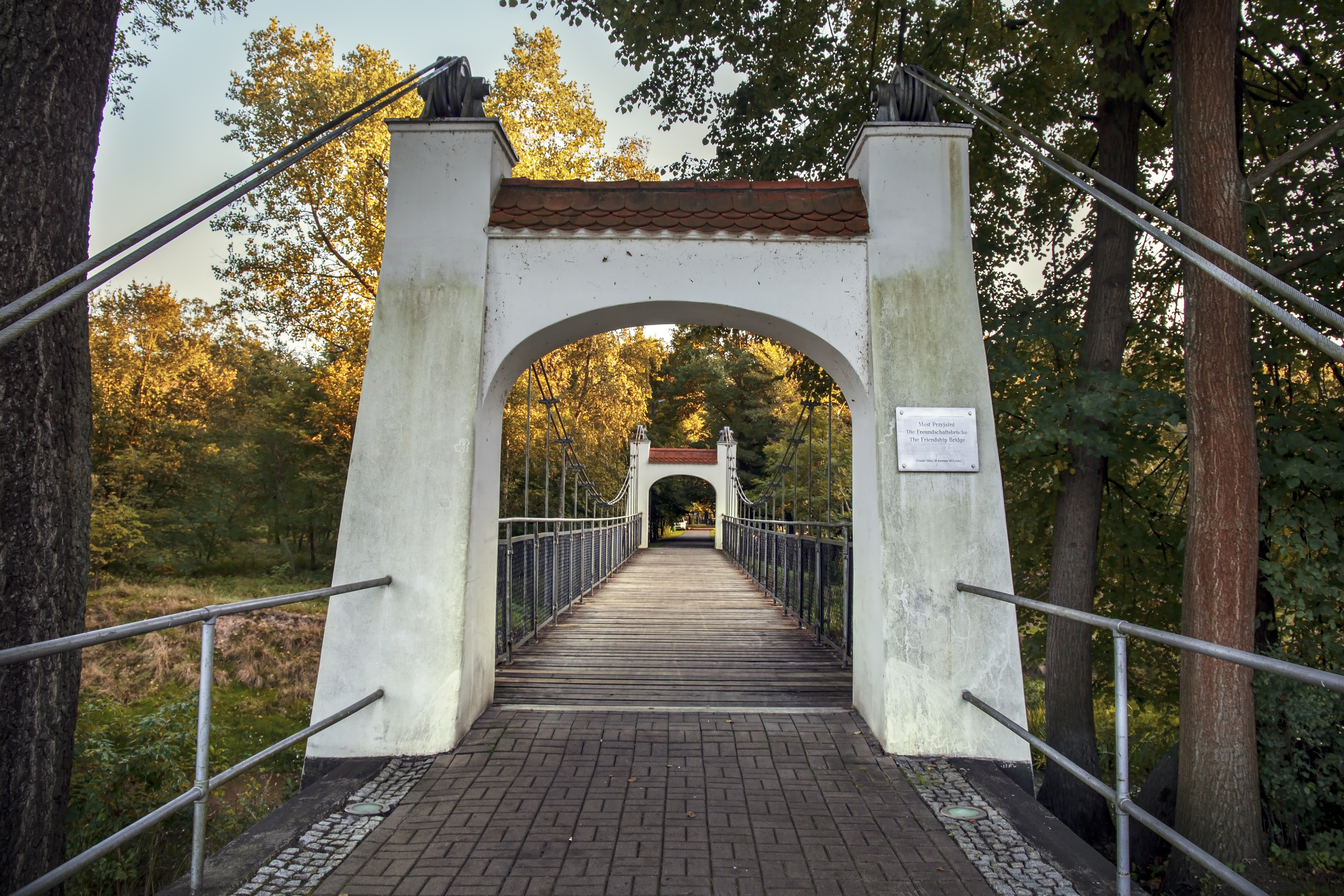 Krupski Młyn, most wiszący na rzece Mała Panew ul. Zawadzkiego